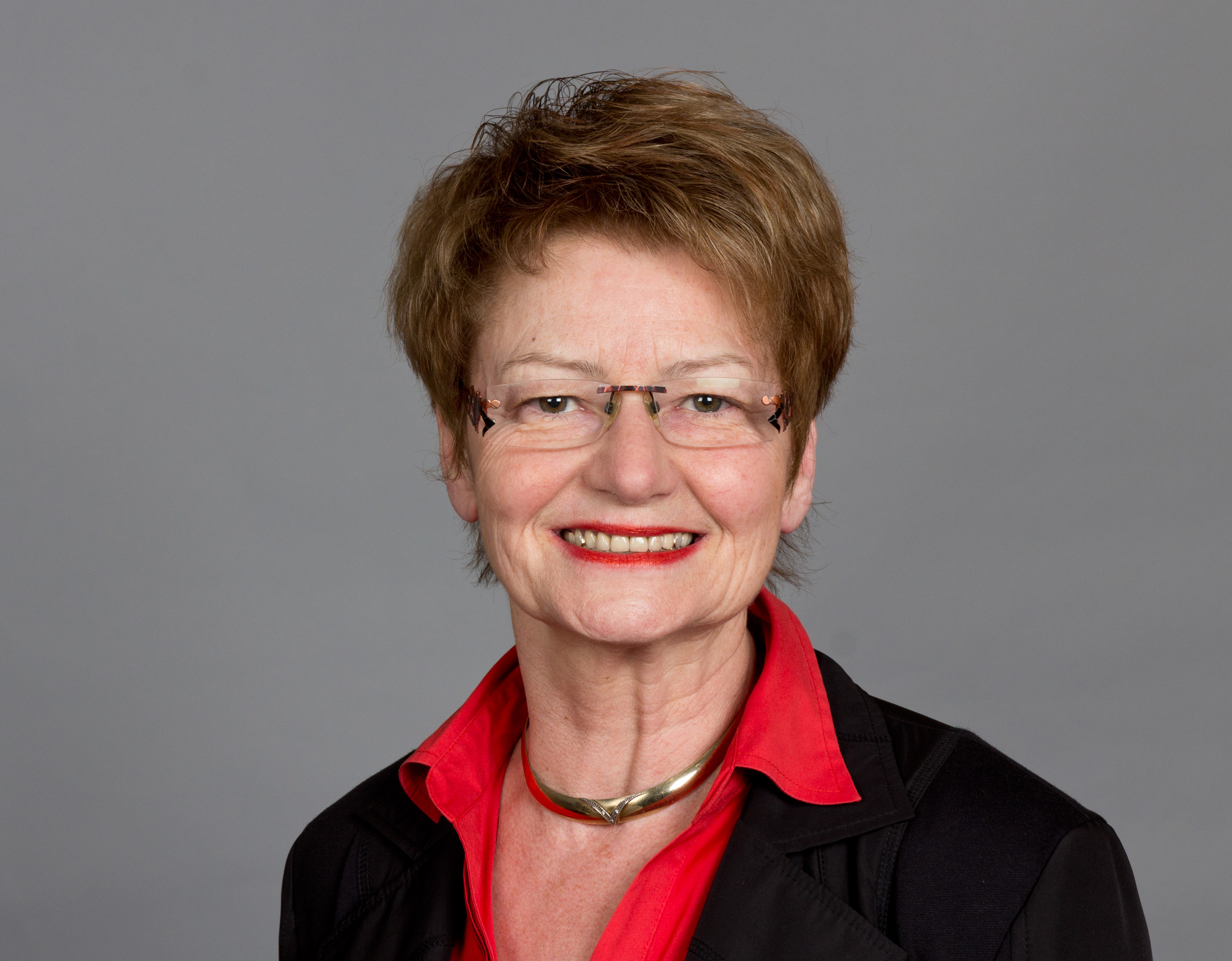 Brigitte Hayn (* 5. Dezember 1953 in Gelsenkirchen-Horst) ist eine deutsche Politikerin (CDU) und Mitglied des Landtages von Rheinland-Pfalz. Landtag Rheinland-Pfalz 2014 19. bis 20. Februar 2014 in MainzDieses Foto wurde im Rahmen des Projektes „WIKI loves parliaments/Landtag Rheinland-Pfalz“ erstellt. Fragen zur Nachnutzung Wenn Sie Fragen zur Nachnutzung dieses Bildes haben, können Sie sich jederzeit gern an wenden